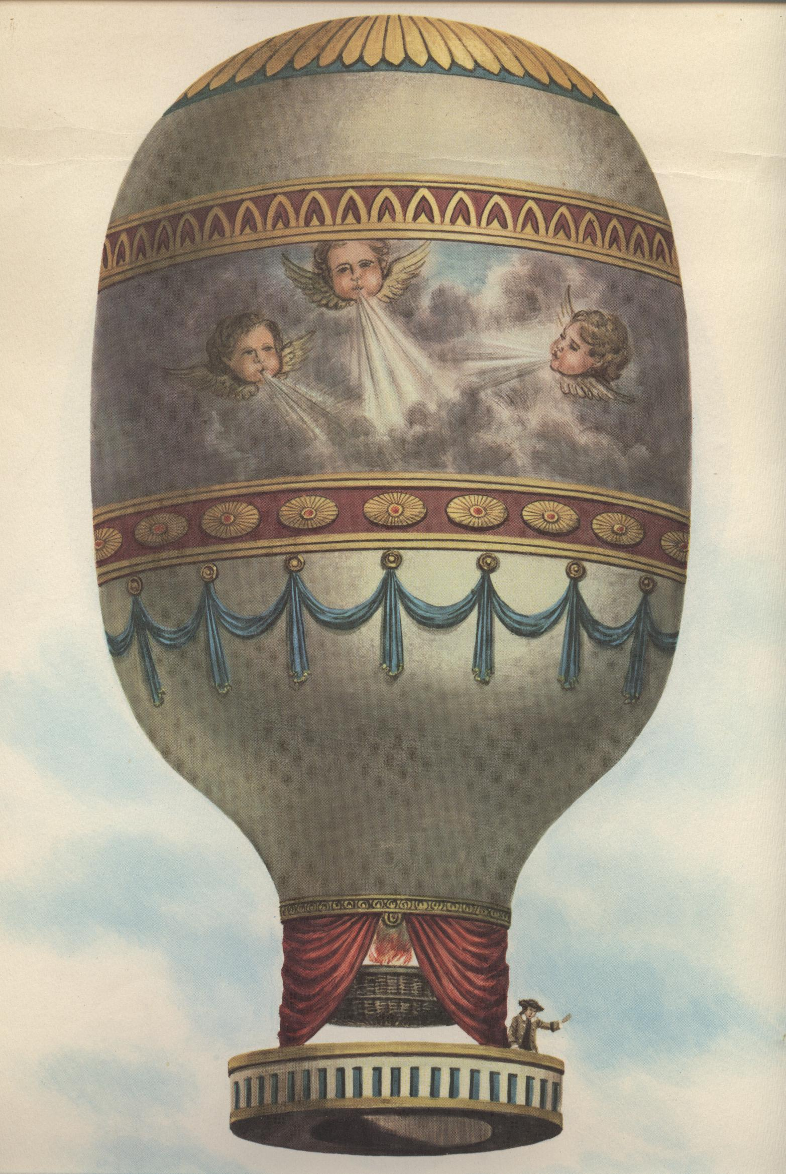 aérostat créé par Jean-François Janinet et Miollan en 1790, gravure ancienne.